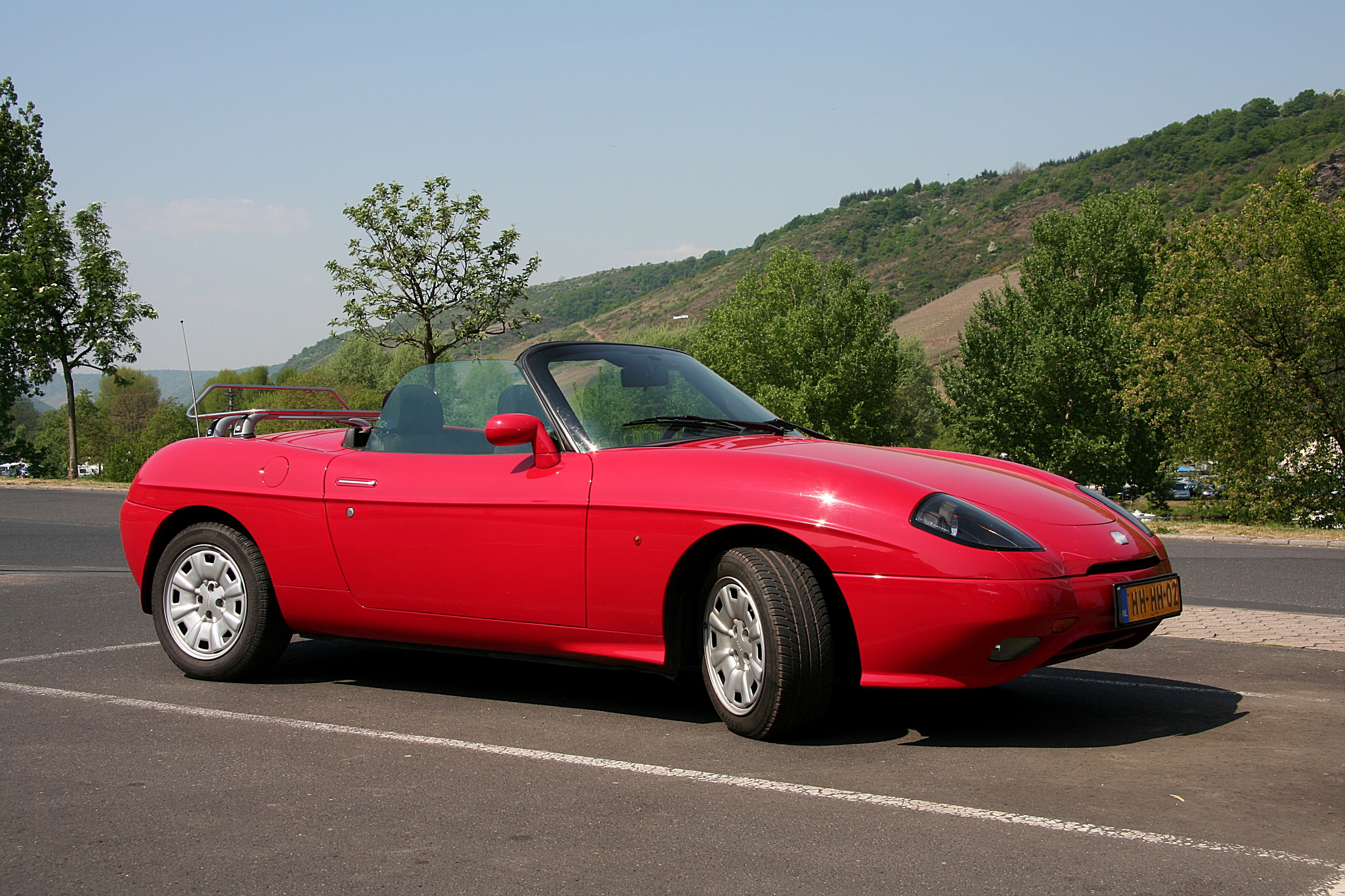 Fiat Barchetta, Baujahr 1997, in Treis-Karden, Sonstiges: Phantasiekennzeichen